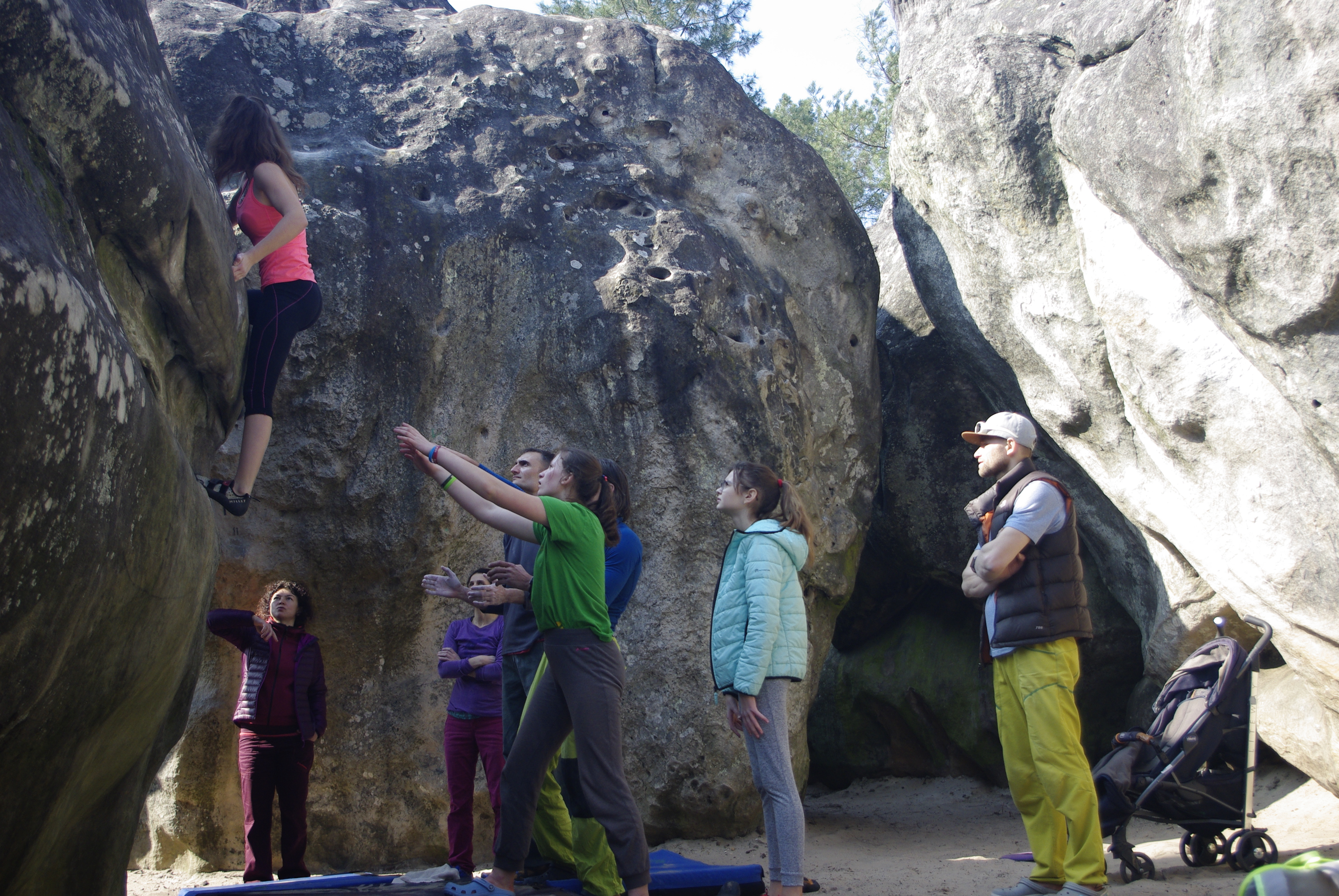 Боулдеринг в секторі Елефант у Фонтебло